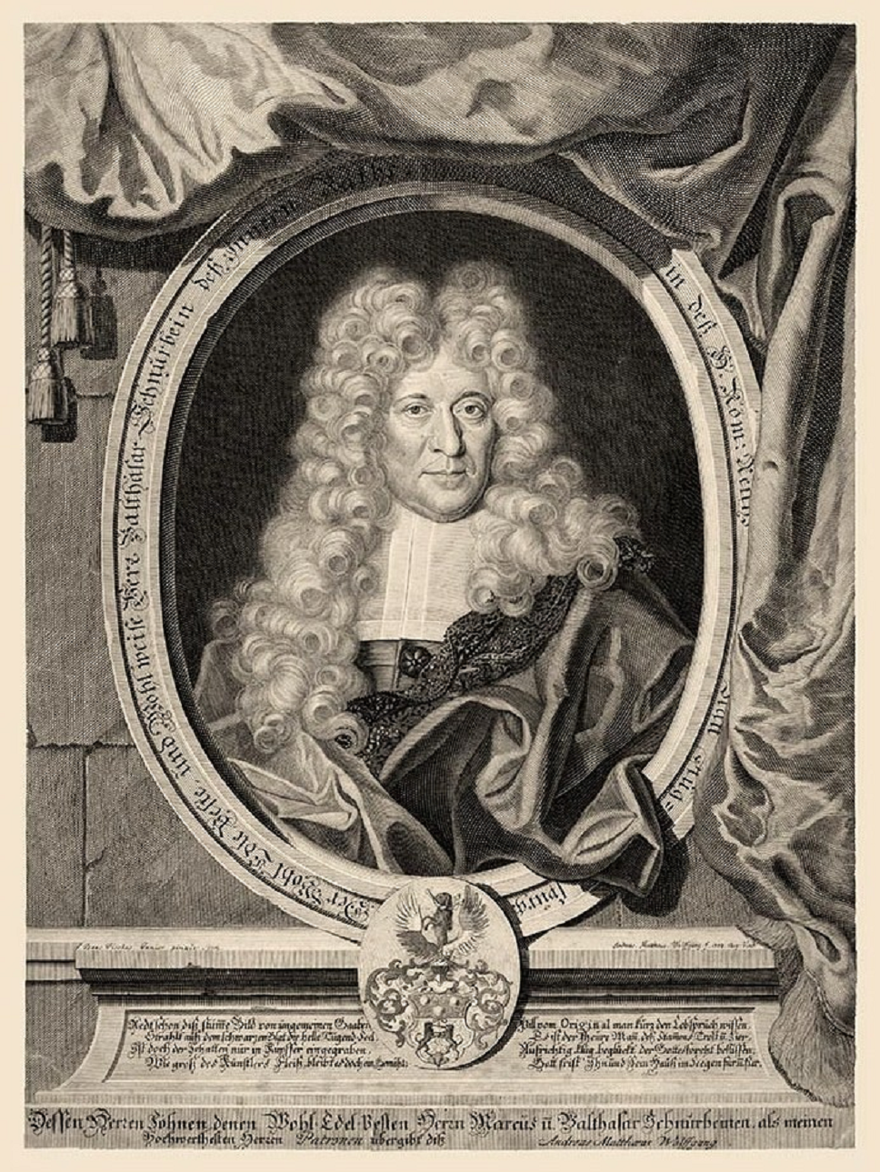 Porträt des Herrn Balthasar Schnurbein von und zu Meitingen, des Inneren Rates der Reichsstadt Augsburg (wurde 1697 in Wien in von Kaiser Leopold I. den erblichen Reichsadelstand (Schnurbein von und zu Meitingen) erhoben).